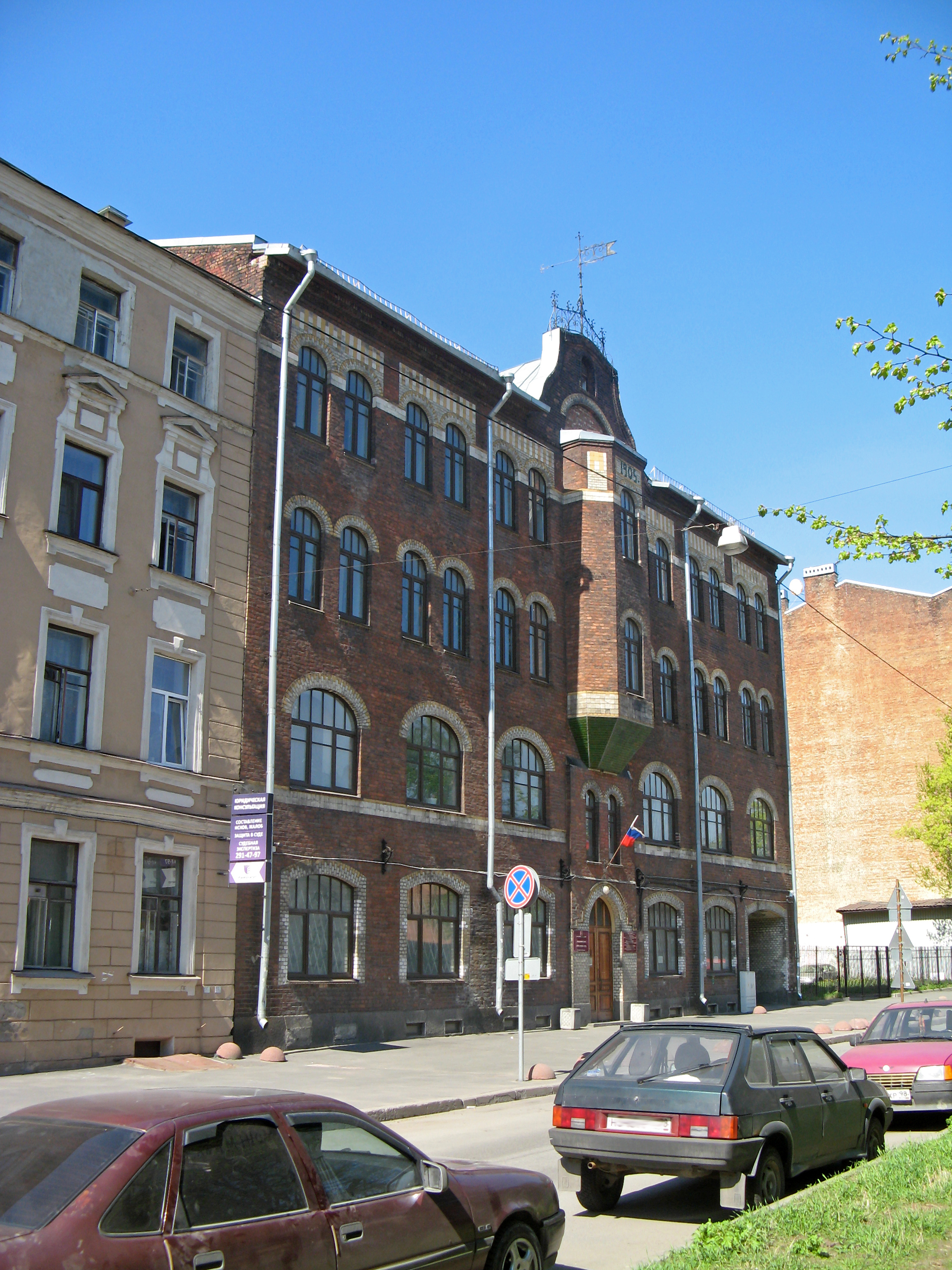 Торговая баня П.И. Кудрявцева (Высшие Стебутовские курсы Общества содействия женскому сельскохозяйственному образованию): Бобруйская улица, 4, Калининский район, Санкт-Петербург